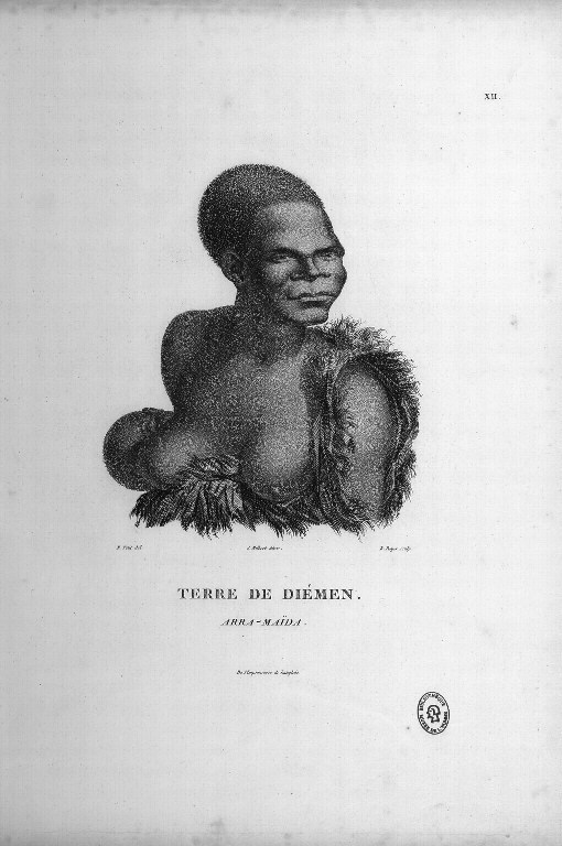 Portrait d'Arra-Maïda dans l'atlas du Voyage de découvertes aux terres australes